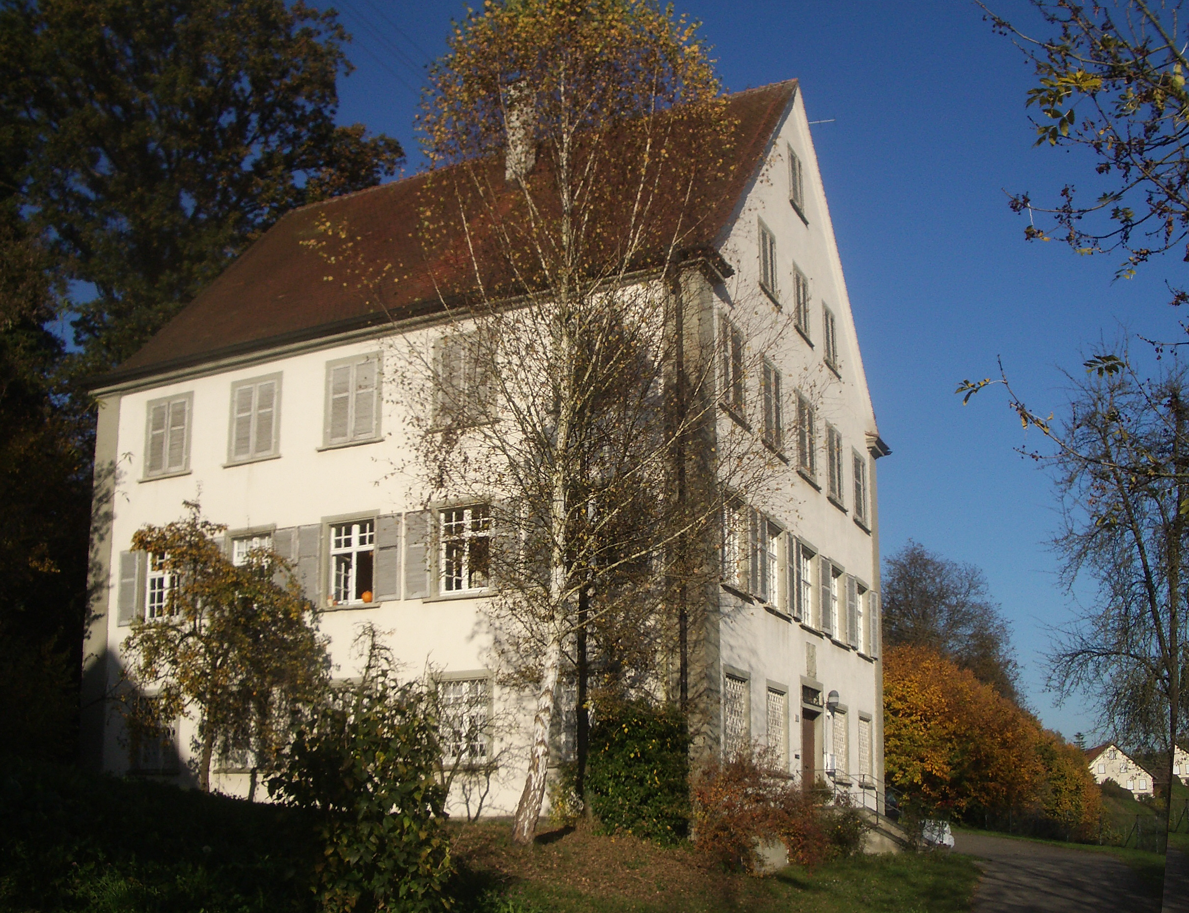 Ravensburg, Ortschaft Taldorf: Pfarrhaus Taldorf